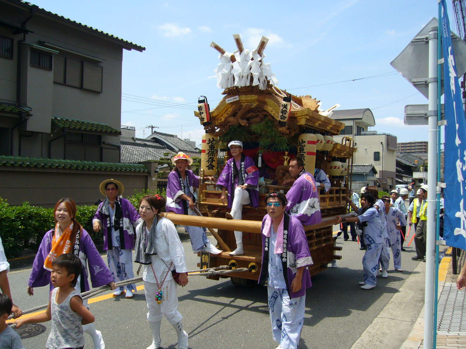 夏祭りだんじり正面の風景